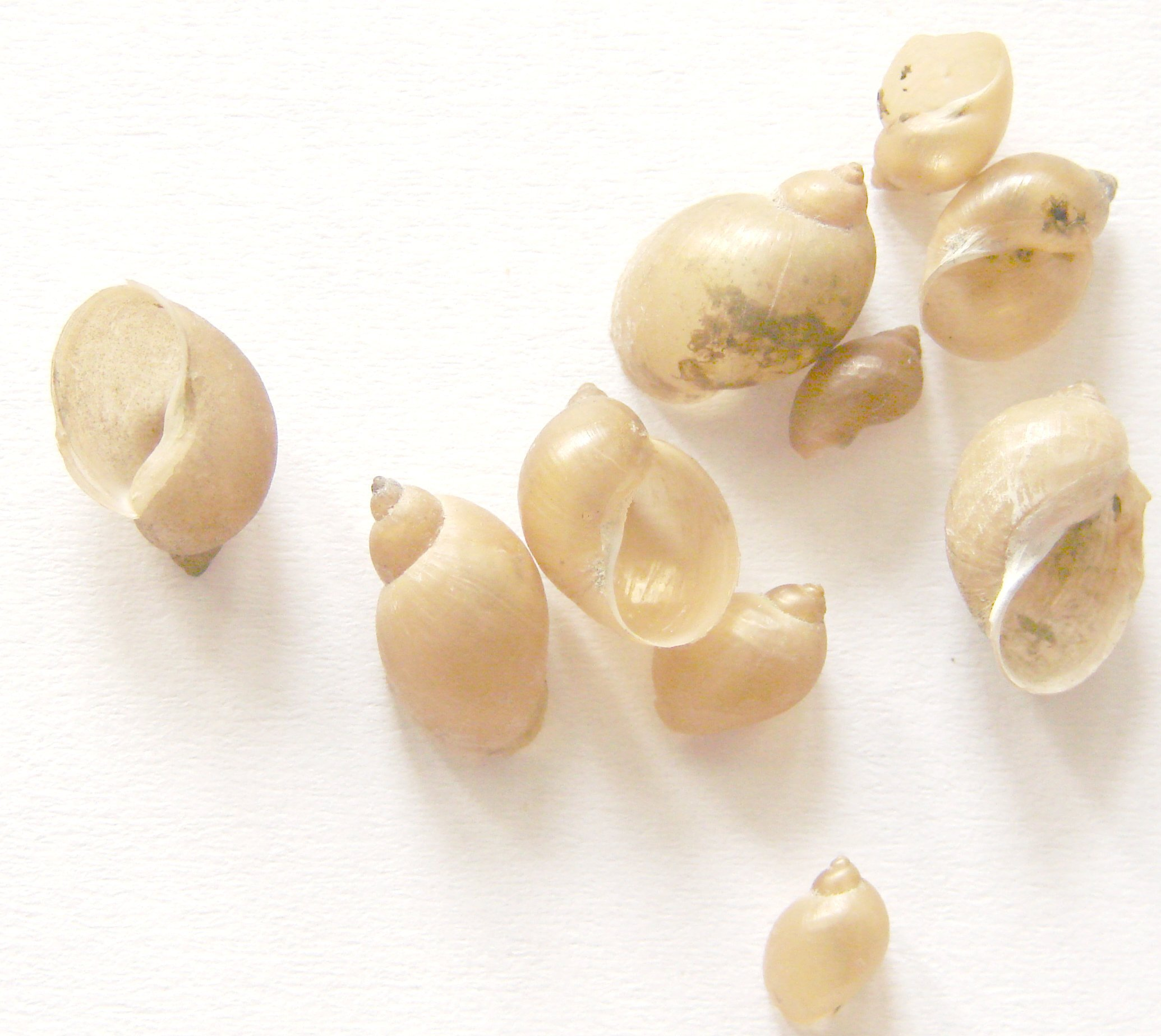 Limnaea peregra var. ovata and var. typica